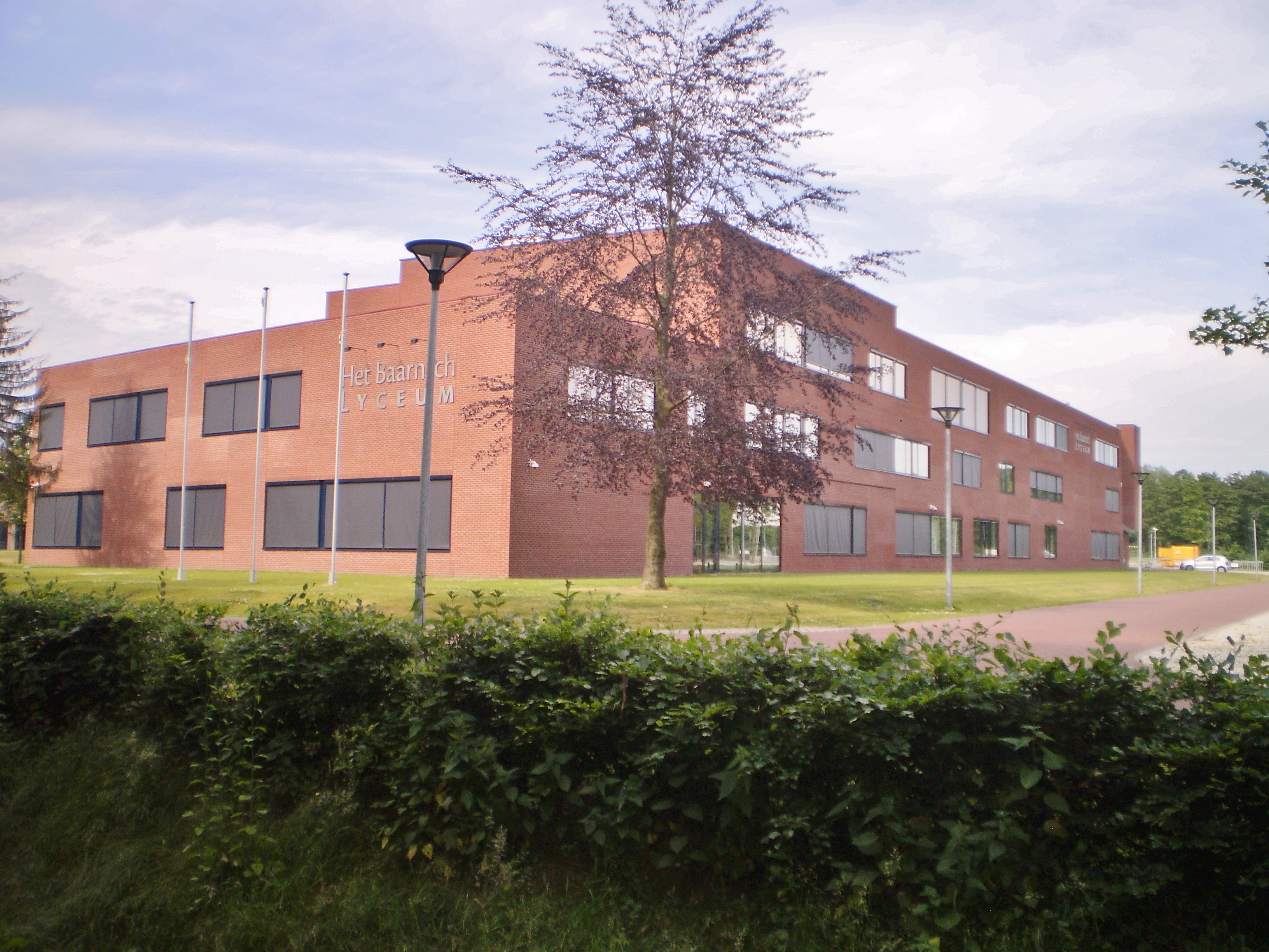 Vanaf de Torenlaan